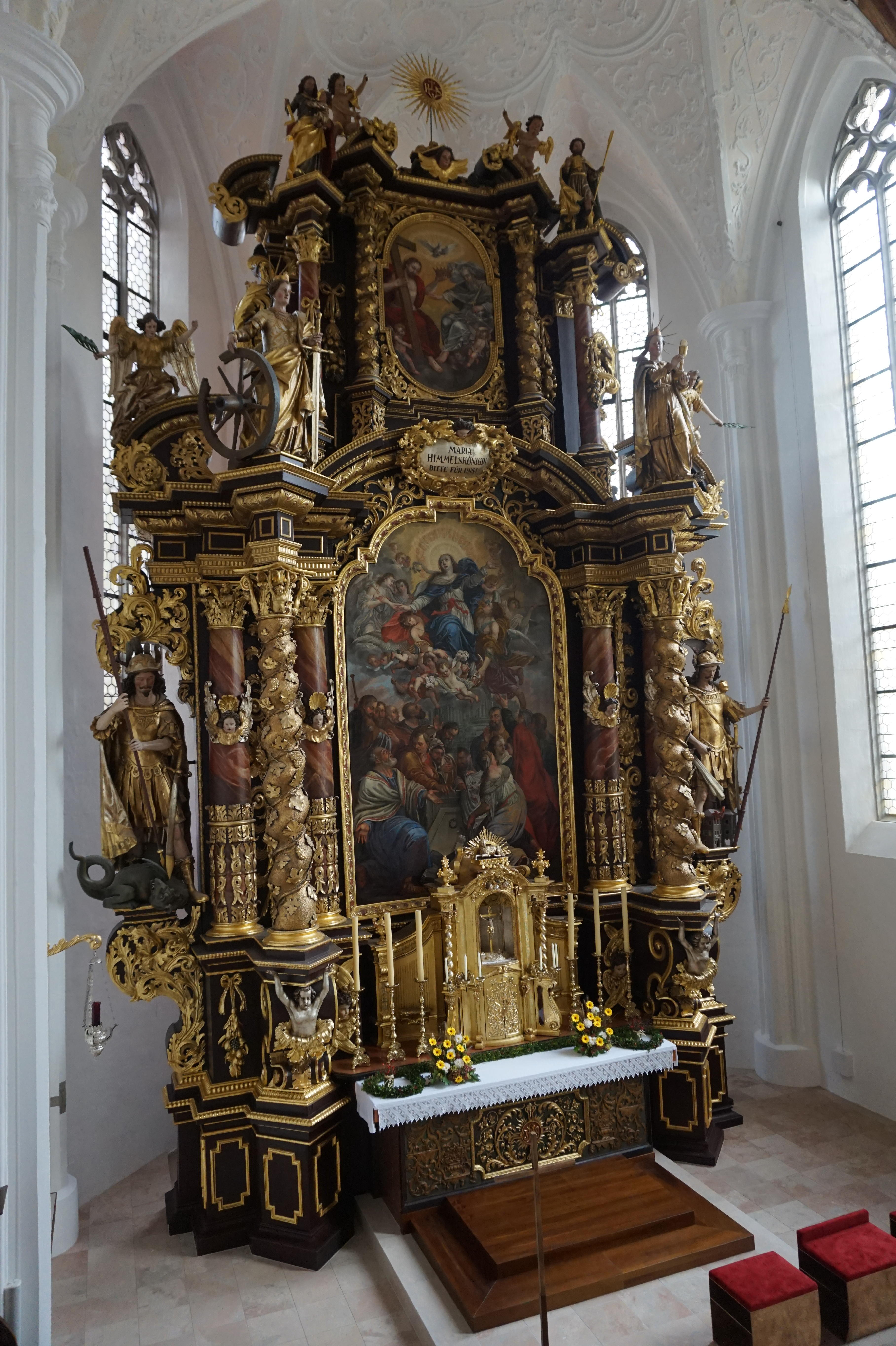 Hochaltar der Pfarrkirche Vöcklamarkt